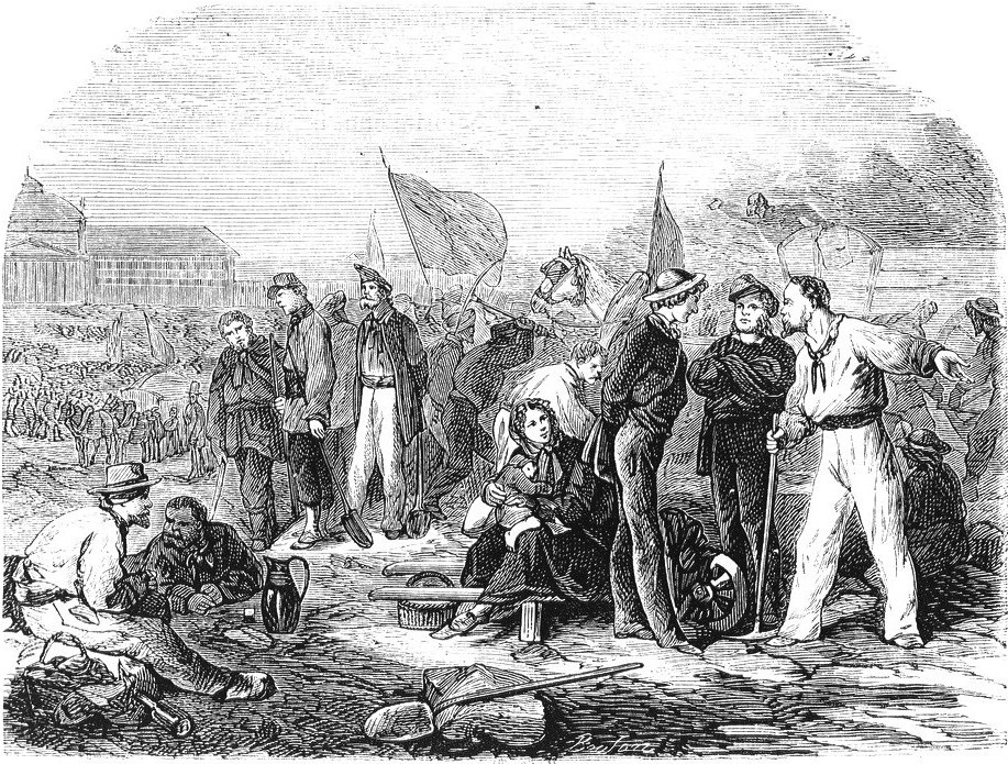 Les Ateliers nationaux au Champ-de-Mars (gravure de Bouton extraite de Histoire de la Révolution de 1848, Paris, Degorie-Cadot, vers 1849, p. 121.